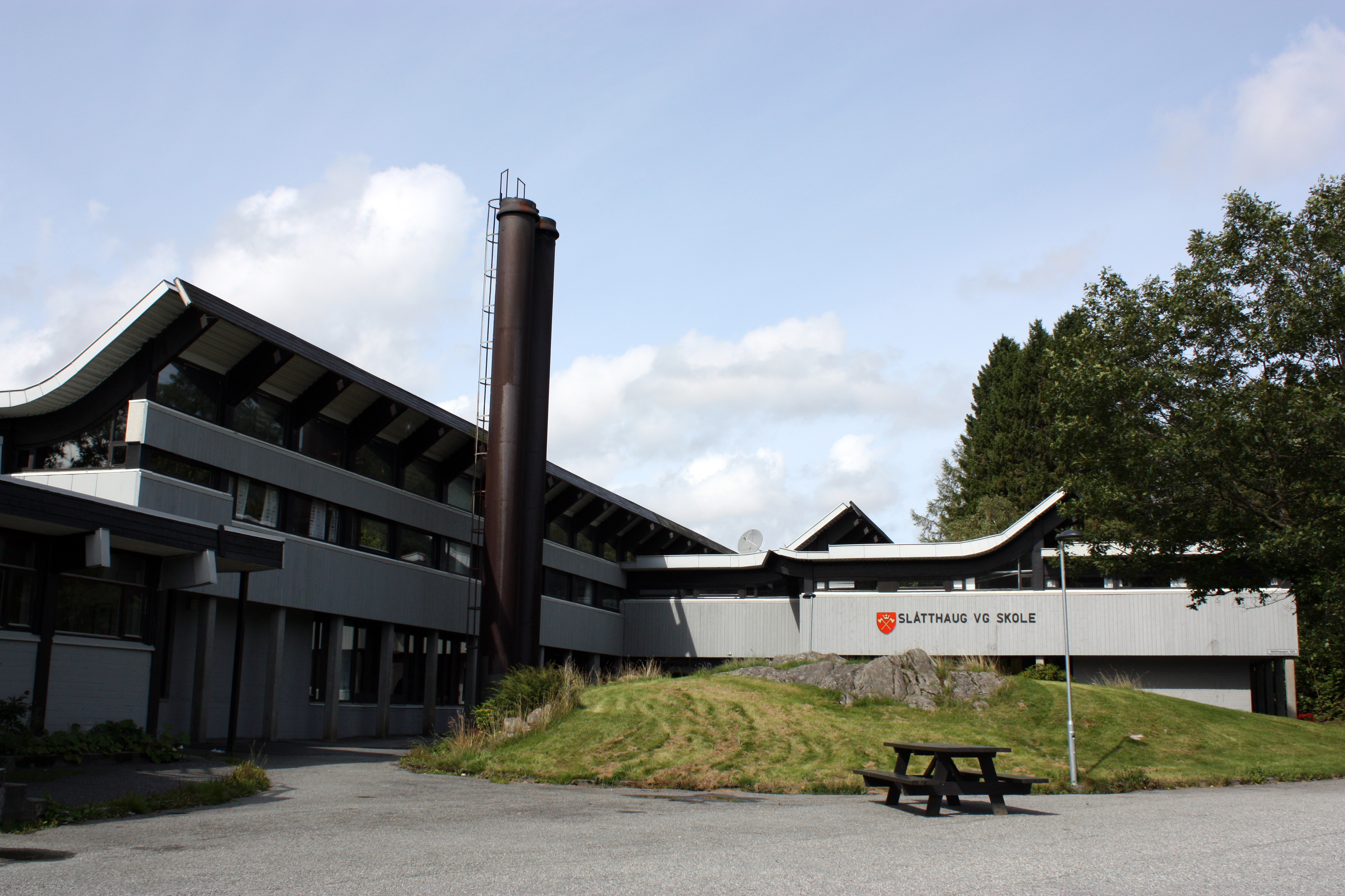 Slåtthaug videregående skole, Fana, Bergen. August 2009.